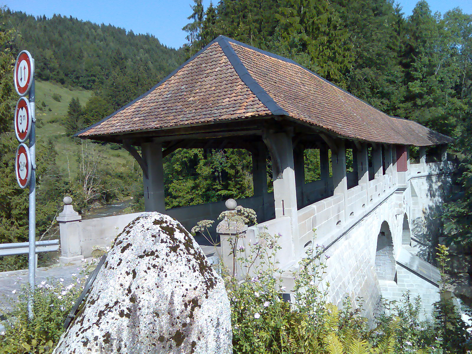 Blick aus Südwesten auf die Teufelsbrücke bei Egg auf dem Gebiet der Gemeinde Einsiedeln. Sie überspannt die Sihl in zwei gemauerten Bogen und hat ein mit Ziegeln gedecktes Holzdach. Links im Bild erkennt man die Signaltafeln mit den Verkehrsbeschränkungen und im Vordergrund der Gedenkstein für Paracelsus.